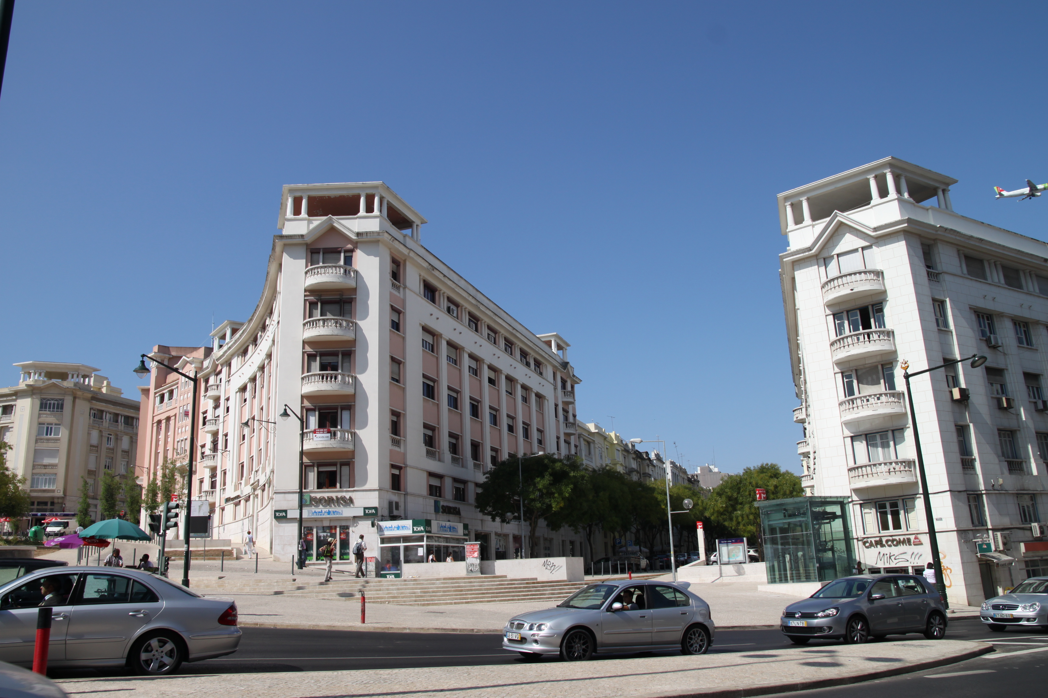 Bairro Azul This file was uploaded for Wiki Loves Monuments in Portugal with the unique identifier 336750.